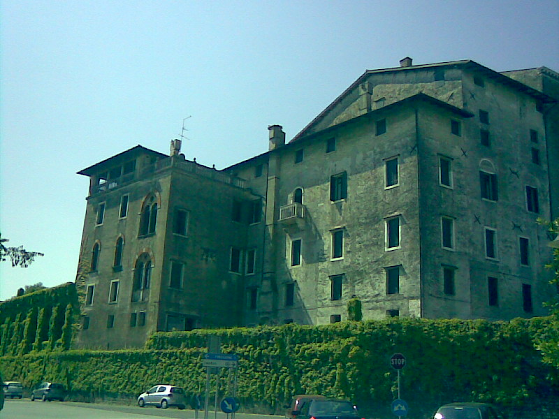 Foto scattata da me con il cellulare